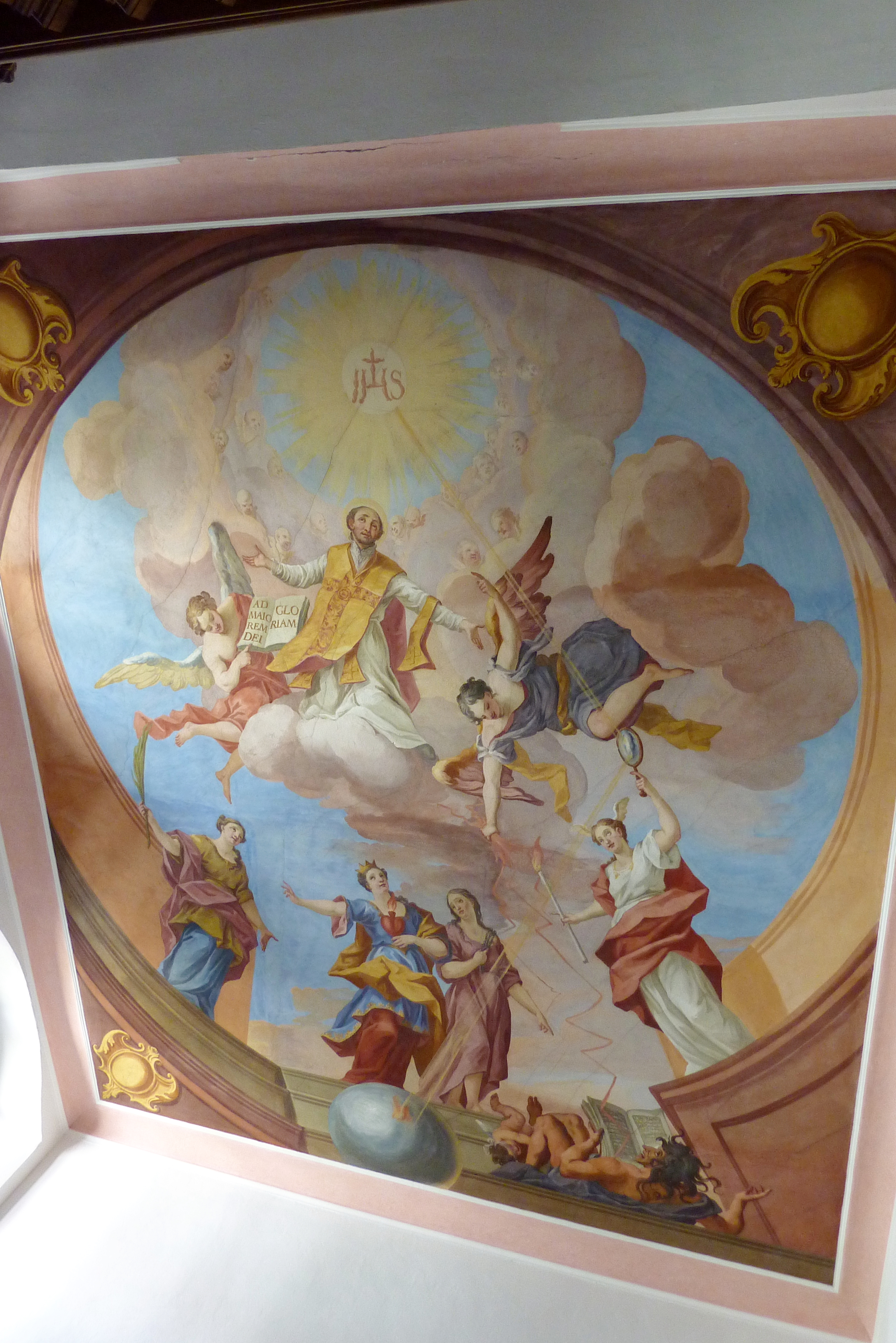 Gebäude der Akademie für Lehrerfortbildung und Personalführung in Bayern in Dillingen an der Donau (Bayern), ehemaliges Jesuitenkolleg, Fresko im Treppenhaus von Joseph Ignaz Schilling (1702–1773), Darstellung: Ignatius von Loyola